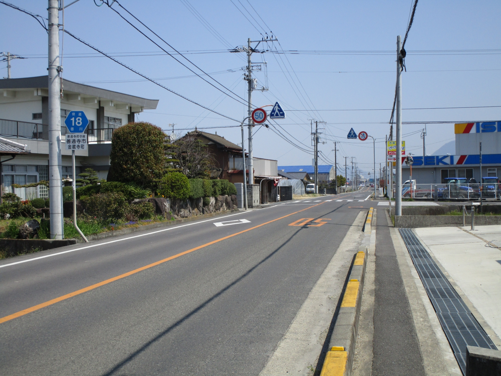 香川県道18号善通寺府中線（善通寺市金蔵寺町、樫藪交差点付近より撮影）